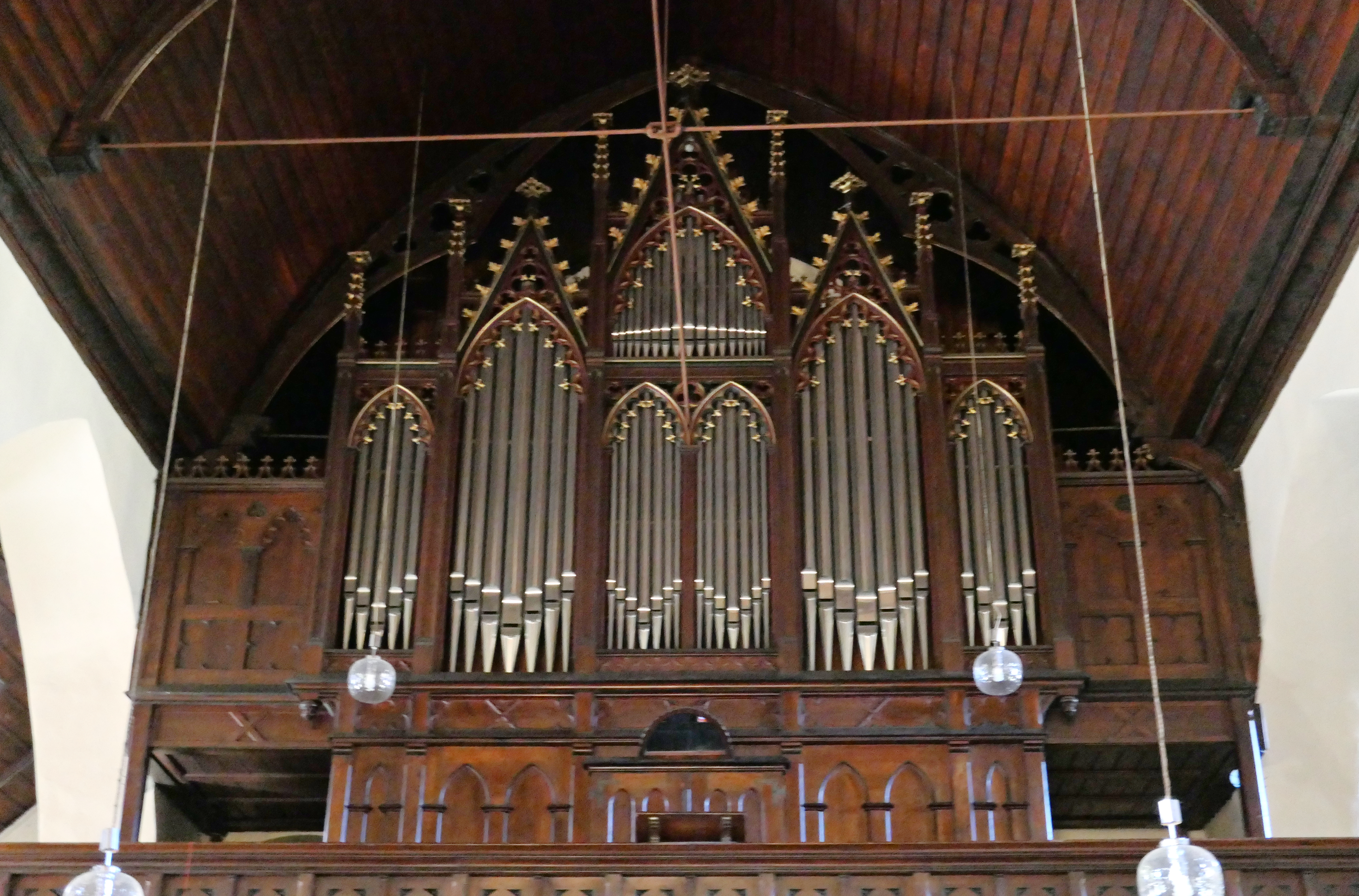 St. Johannis Wernigerode, Landkreis Harz, Sachsen-Anhalt, Deutschland